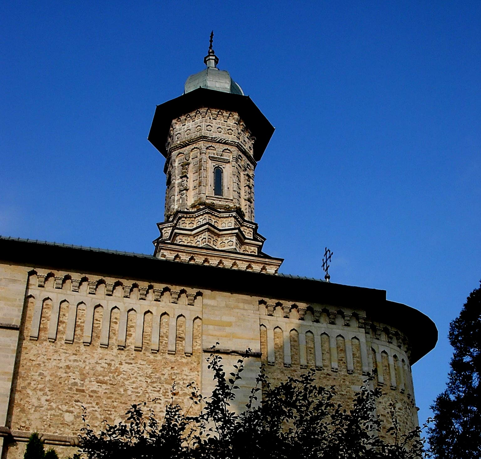 DRAGOMIRNA